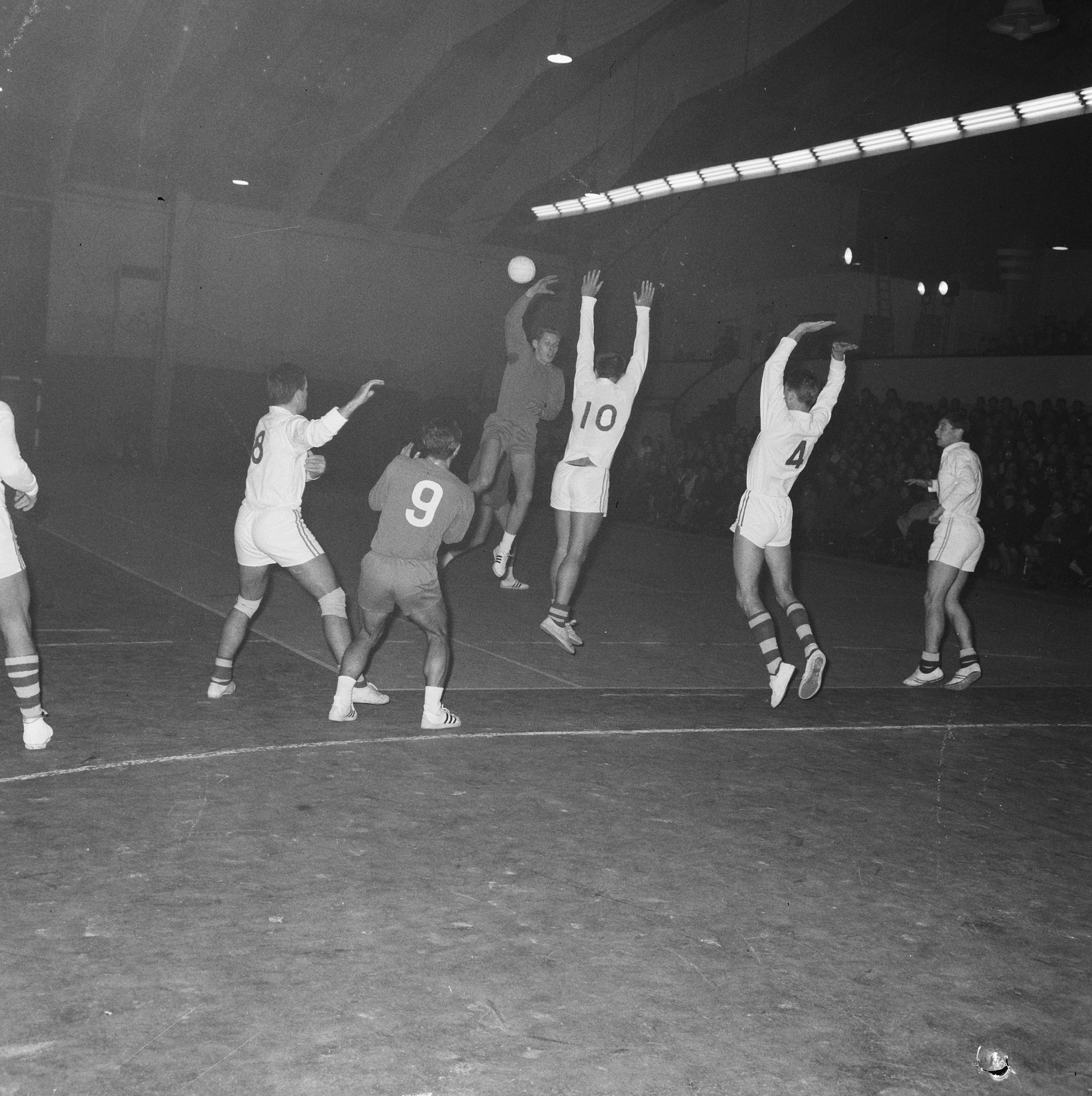 Collectie / Archief : Fotocollectie Anefo Reportage / Serie : [ onbekend ] Beschrijving : Europacup zaalhandbal Operatie 55 tegen Dudelange 11-1 spelmoment Datum : 7 november 1964 Trefwoorden : handbal Instellingsnaam : Europacup, Operatie 55 Fotograaf : Nijs, Jac. de / Anefo Auteursrechthebbende : Nationaal Archief Materiaalsoort : Negatief (zwart/wit) Nummer archiefinventaris : bekijk toegang 2.24.01.03 Bestanddeelnummer : 917-1078